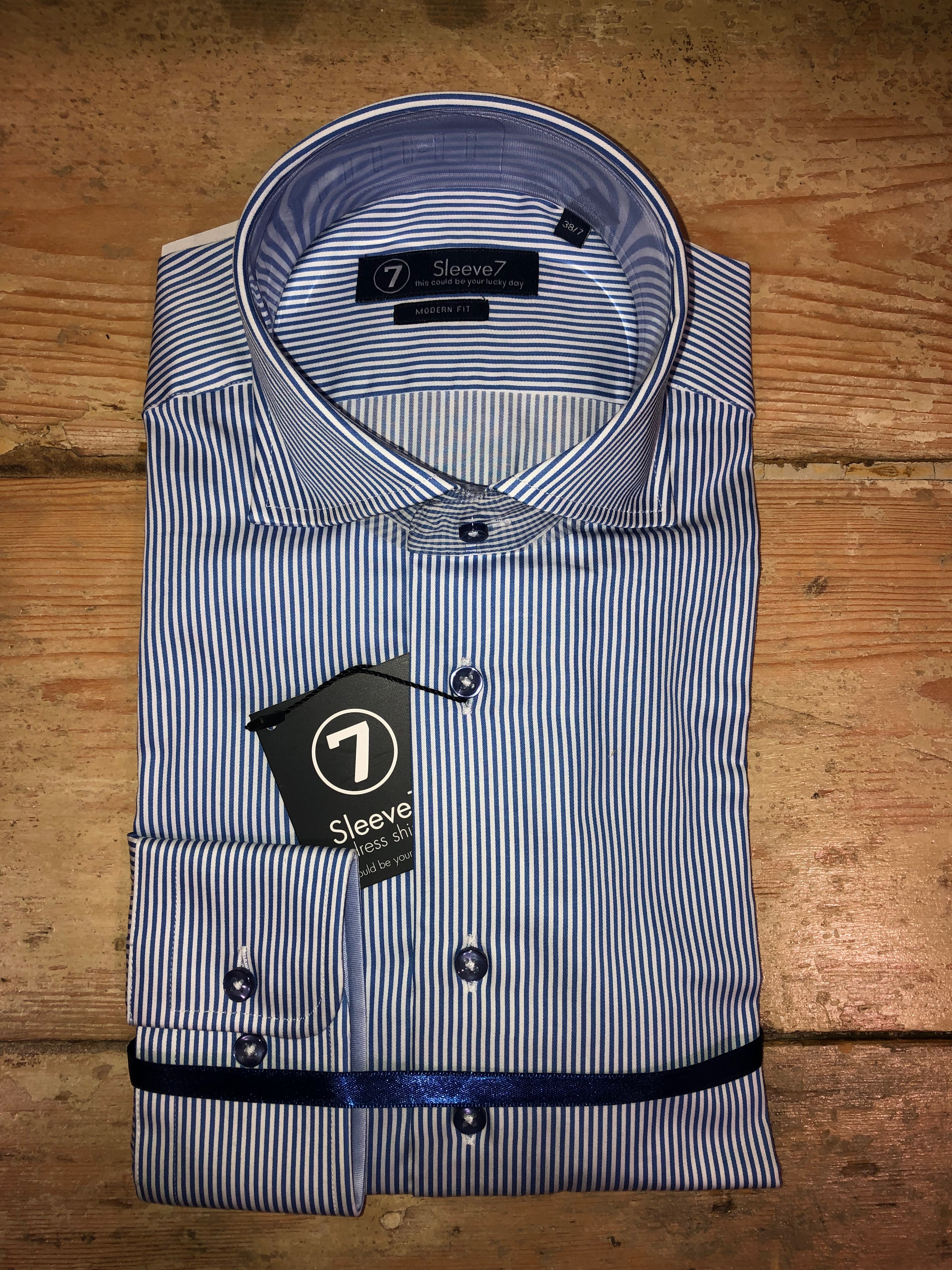 Overhemd blauw met witte strepen - goed zichtbaar zijn de knopen, de lijst en de kraag. Het overhemd bevat aan plaquet, hangtag en een banderole.